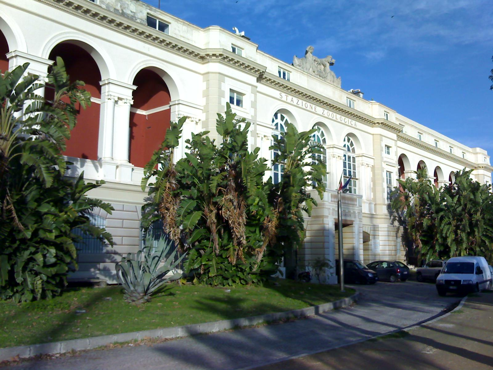 Stazione Zoologica Anton Dorhn (Napoli, Villa Comunale)